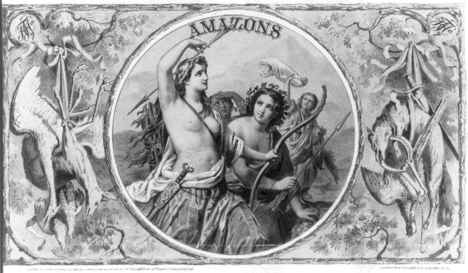 Amazons after hunt.